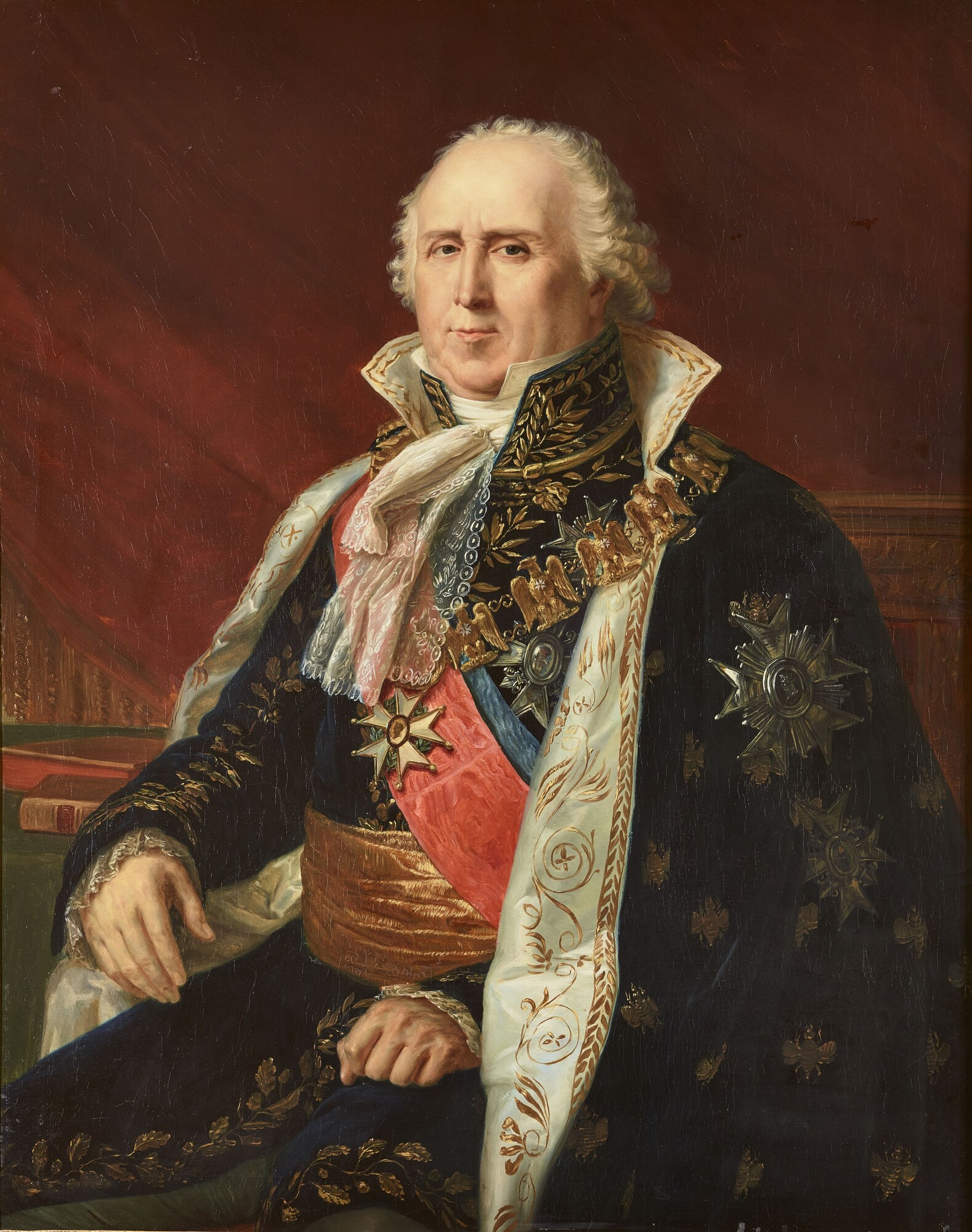 Portrait de Charles-François Lebrun, duc de Plaisance, architrésorier de l'Empire.